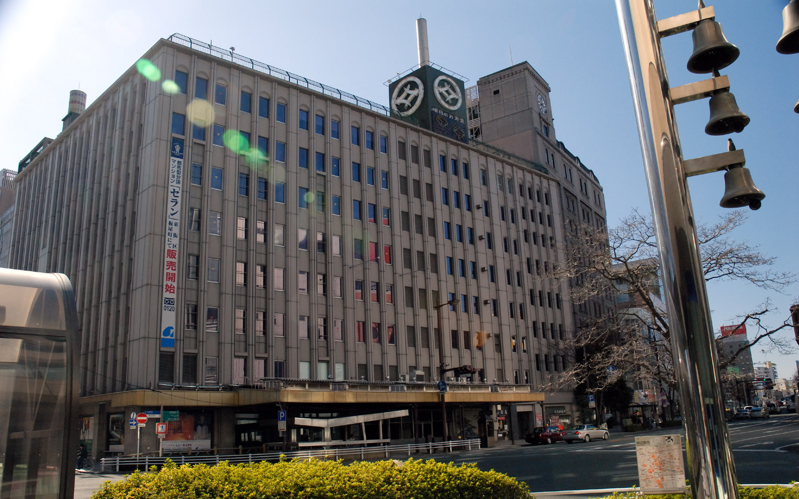 Matsubishi department store, Hamamatsu Japan.